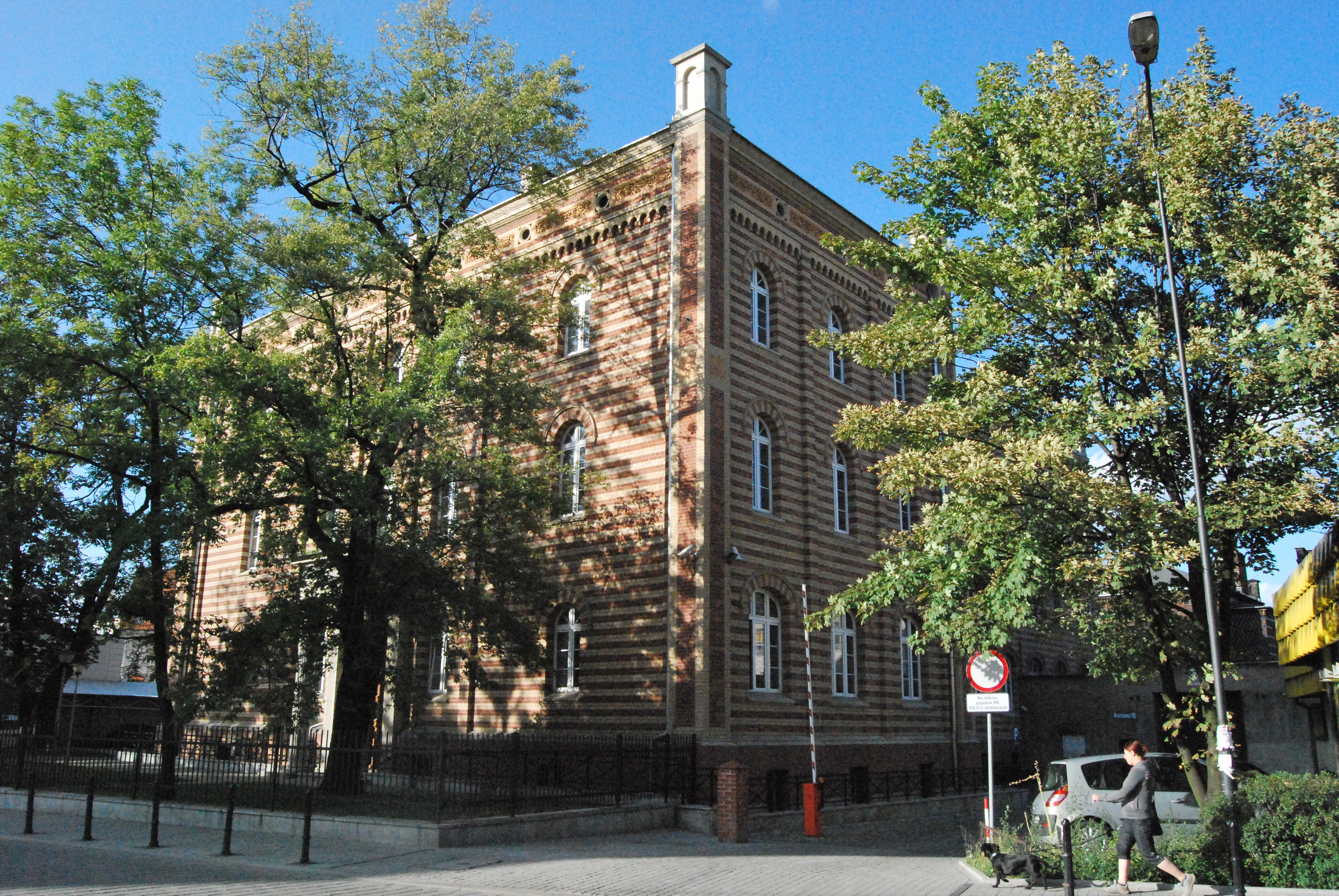 Gliwice, ul. Wieczorka 10 - budynek Zespołu Szkół Samochodowych (zabytek A/1373/88)